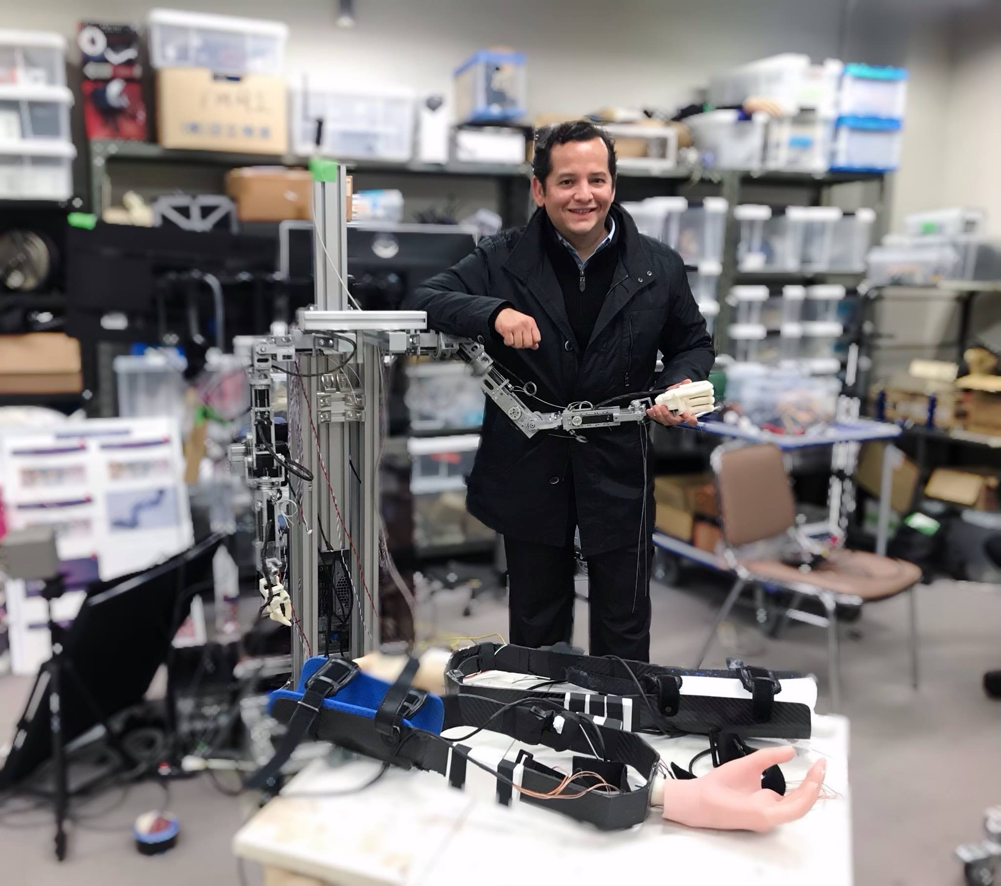 Alvaro Rios Poveda, trabajando en el laboratorio de Biónica.